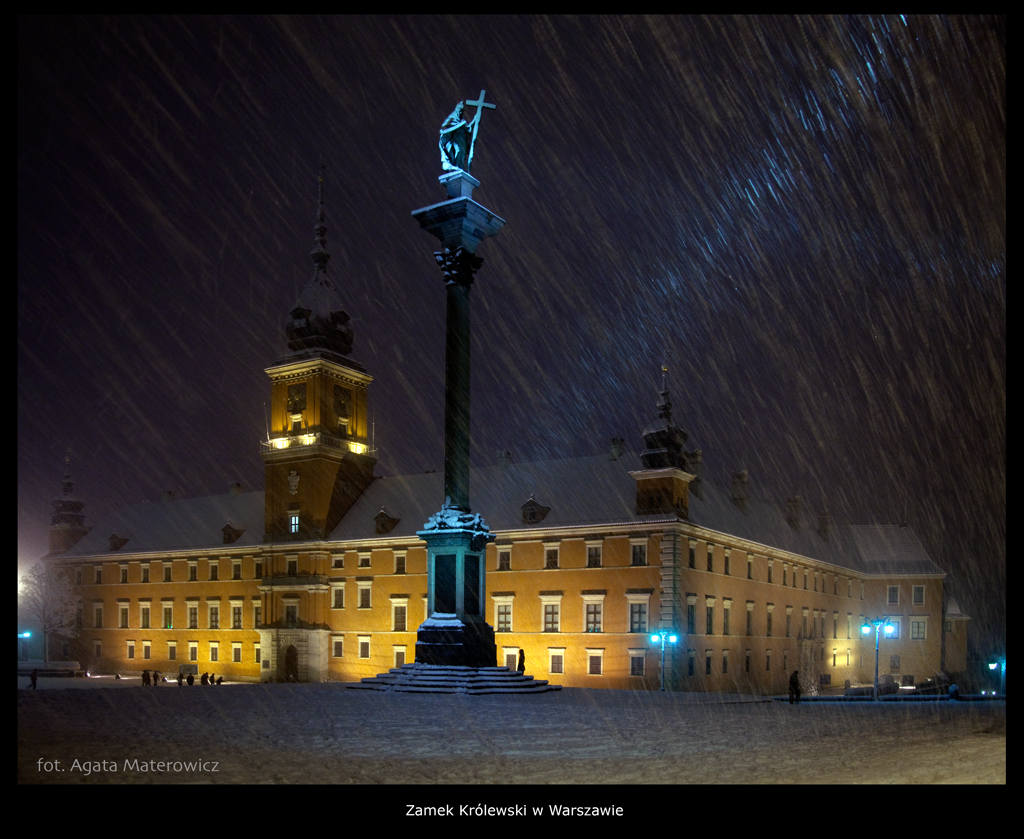 Zamek Królewski w Warszawie